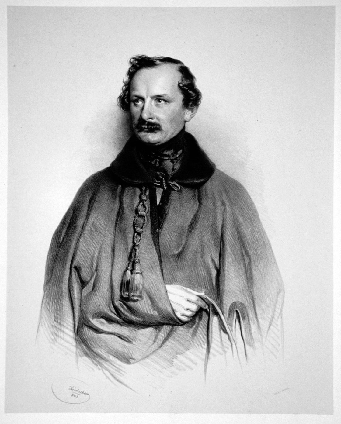 Ferdinand Freiherr von Mensshengen (1801-1885), Geheimrat, 1856-1867 österreichischer Botschafter in Bern.